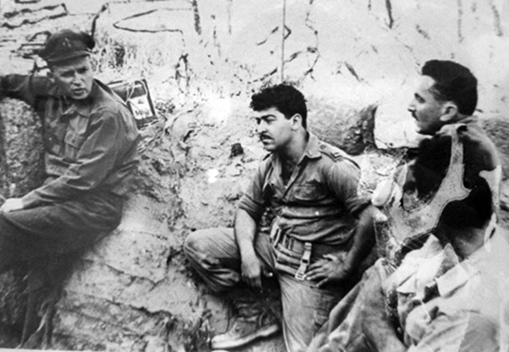 יצחק רבין עם בנימין בן אליעזר בפיקוד הצפון